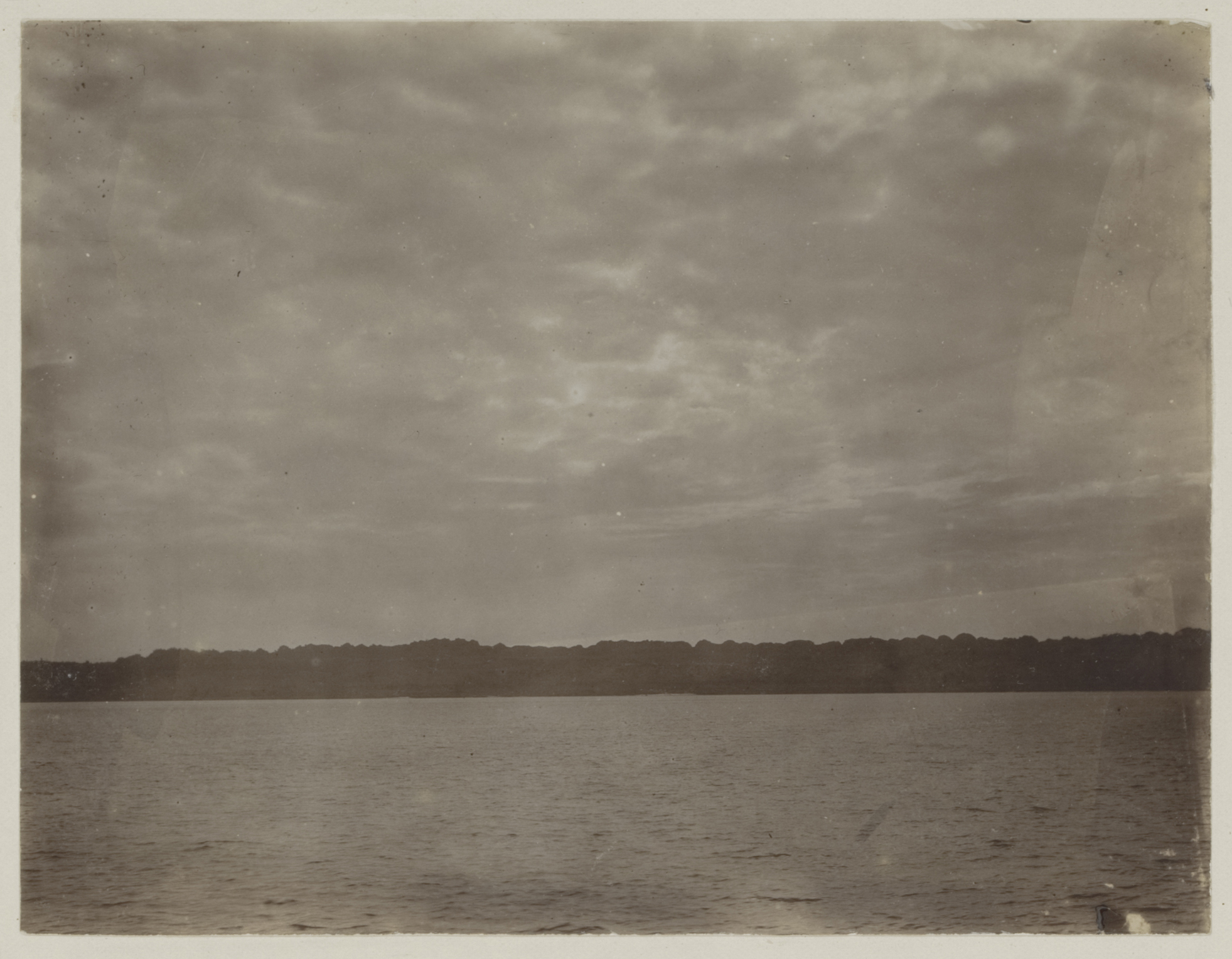 Academische Collecties: 1899-1900, Siboga-expeditie naar Nederlands Oost-Indië, onder leiding van Max Wilhelm Carl Weber Gezicht op de eilanden, gelegen in het midden van de Banda Zee